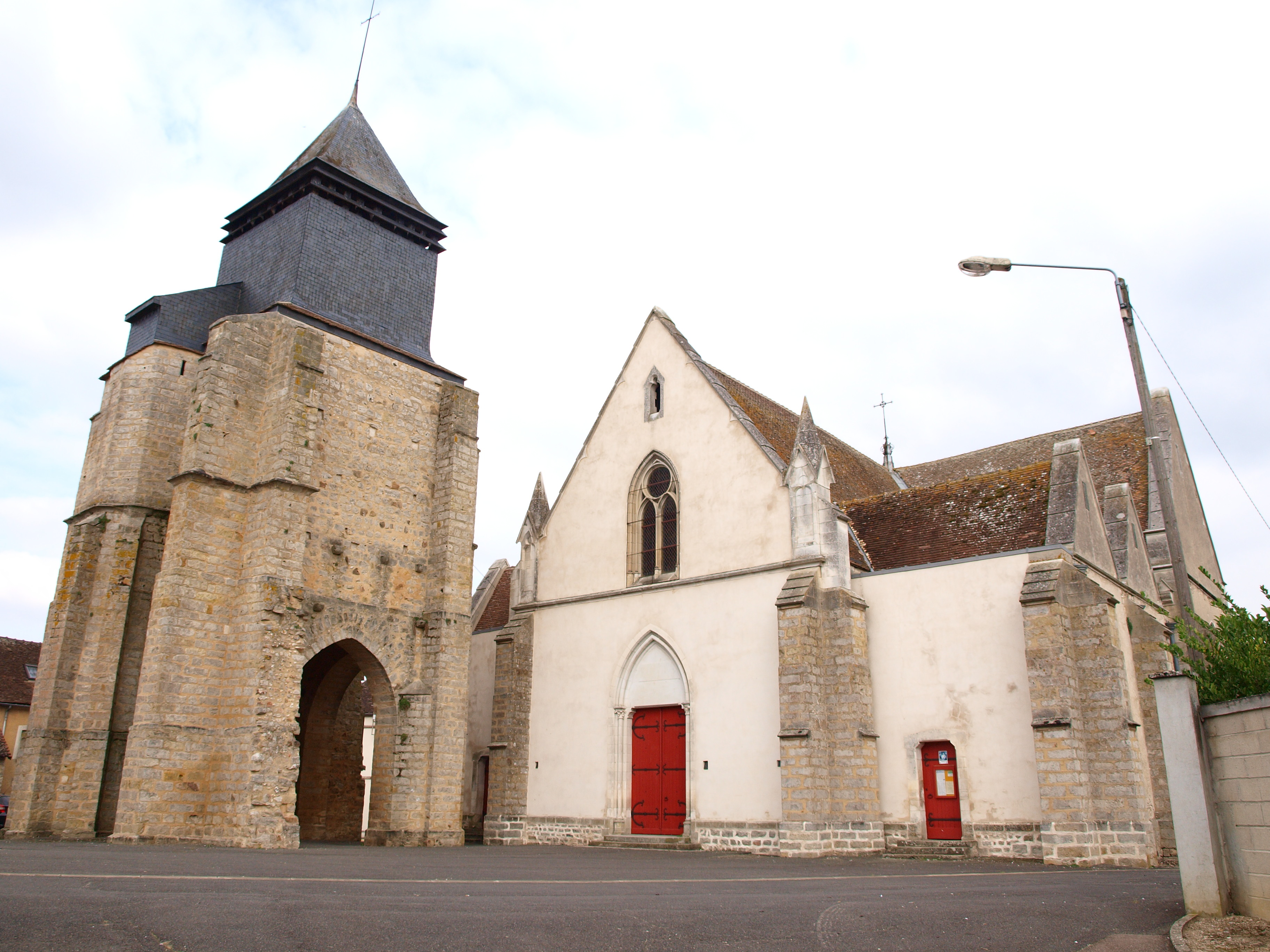 Malay-le-Grand (Yonne, France) ; église